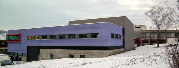 Nordland teater, Mo i Rana.